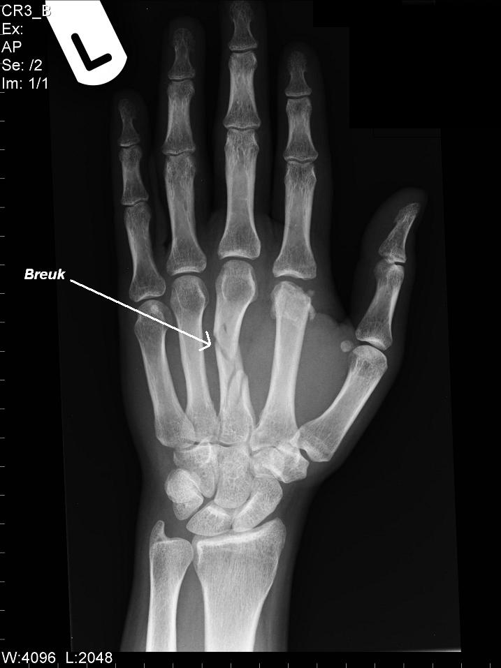 voorbeeld botbreuk, breuk van mijn vriendin Author:foto verkregen van het Reinier de Graaf ziekenhuis